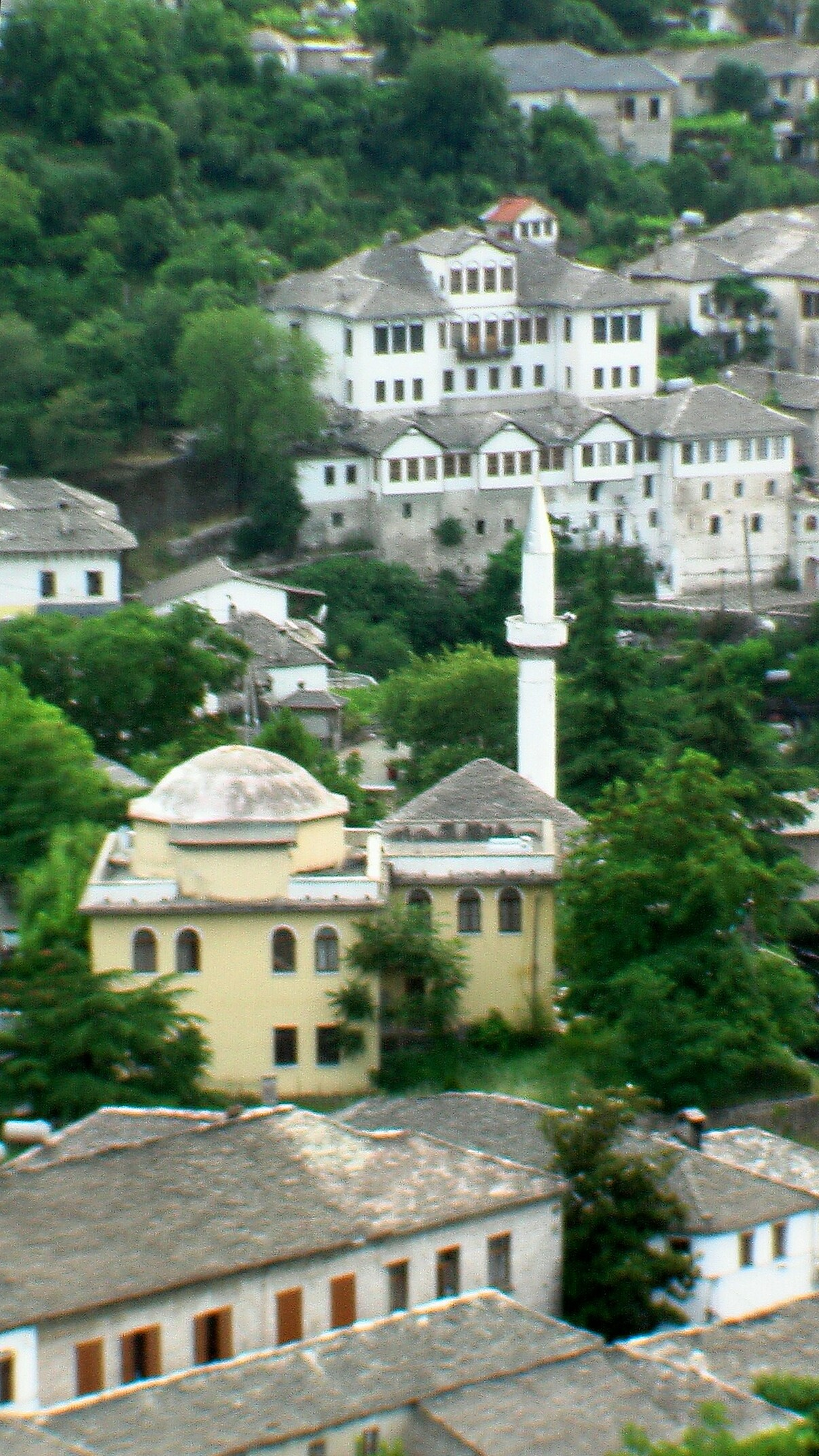 GjirokastraMoschee